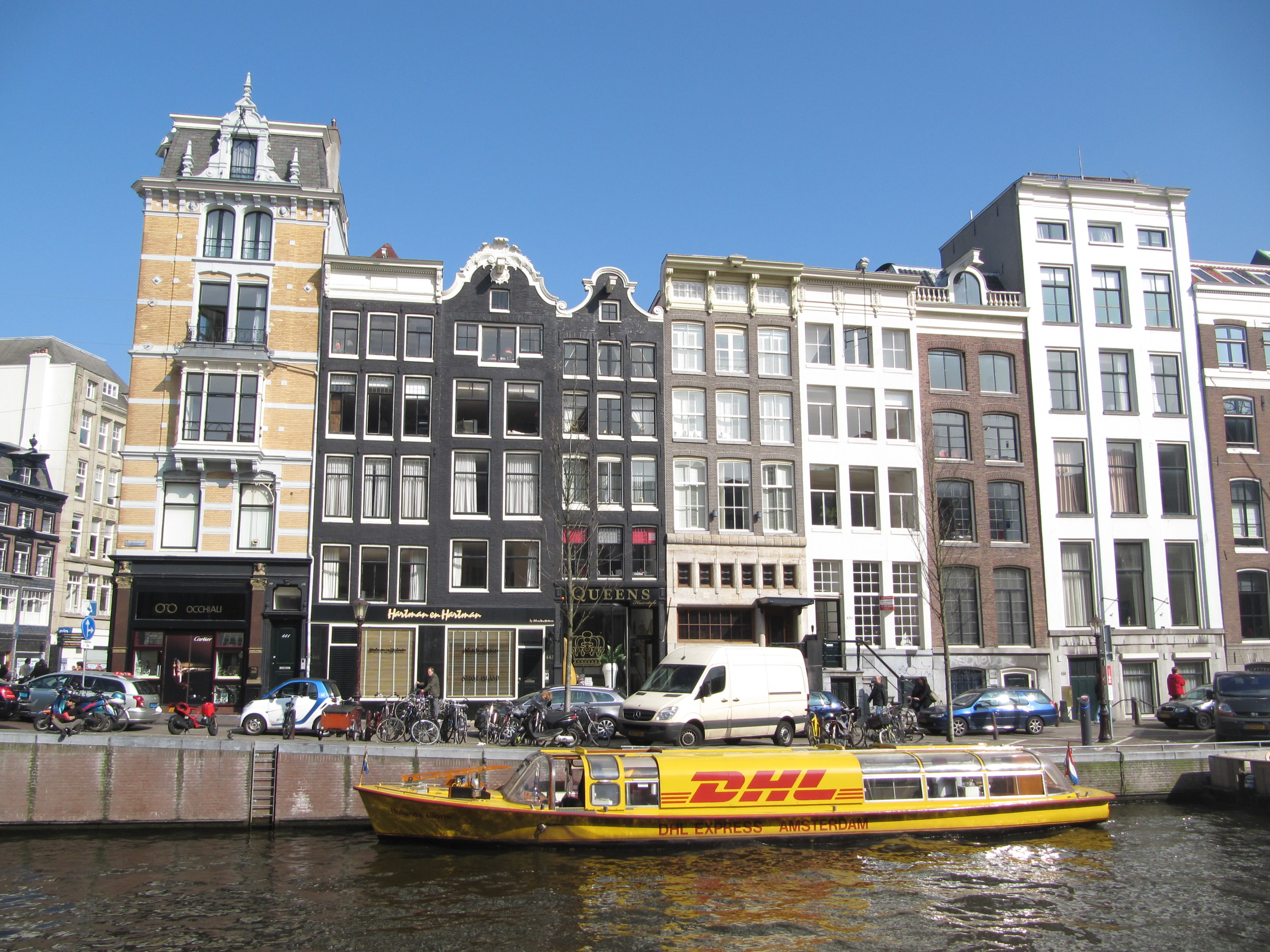 RM1642 Herengracht 445.jpg This is an image of rijksmonument number 1641 This is an image of rijksmonument number 1642